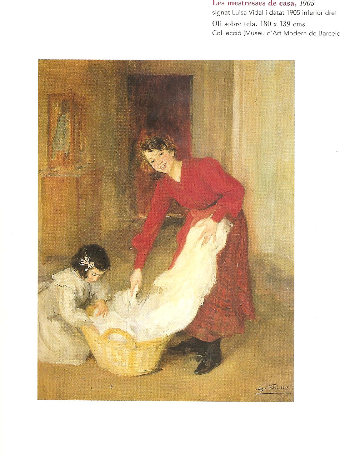 Les mestresses de casa, 1905 Oli sobre tela. 180 x 139 cms MNAC 11675